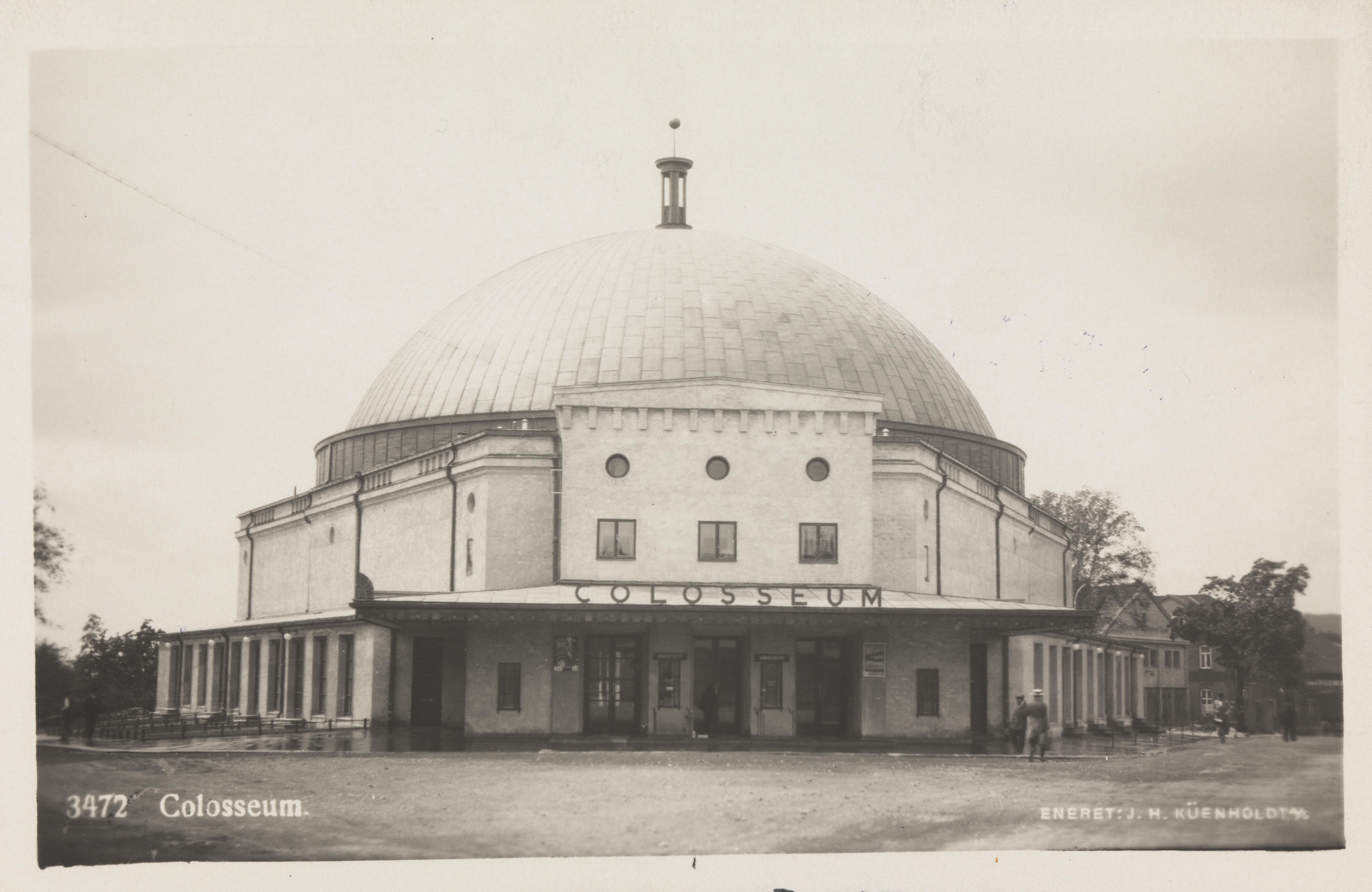 Bildet er hentet fra Nasjonalbibliotekets bildesamling Majorstua, Oslo, Oslo